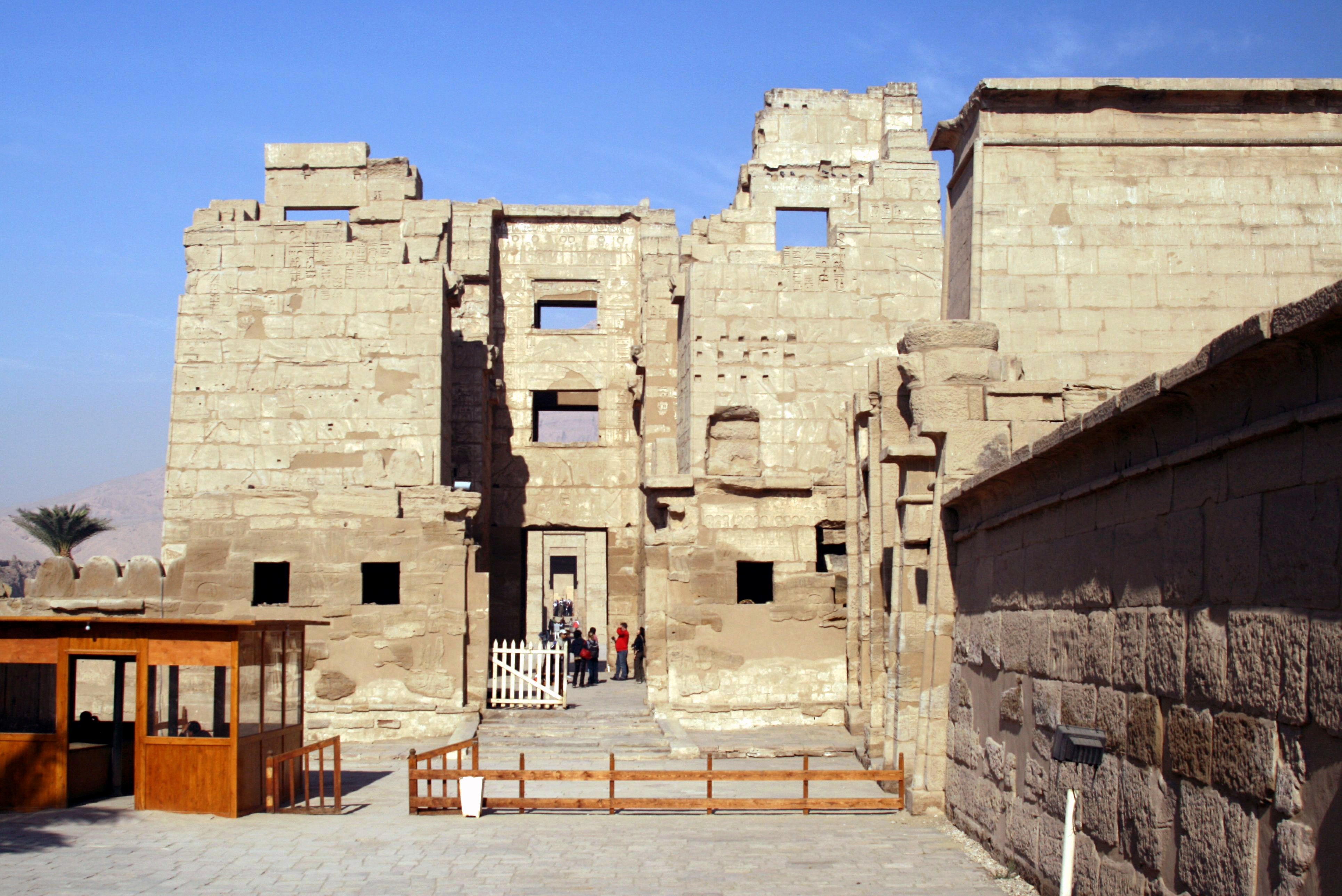 Medinet Habu - Migdol Gate